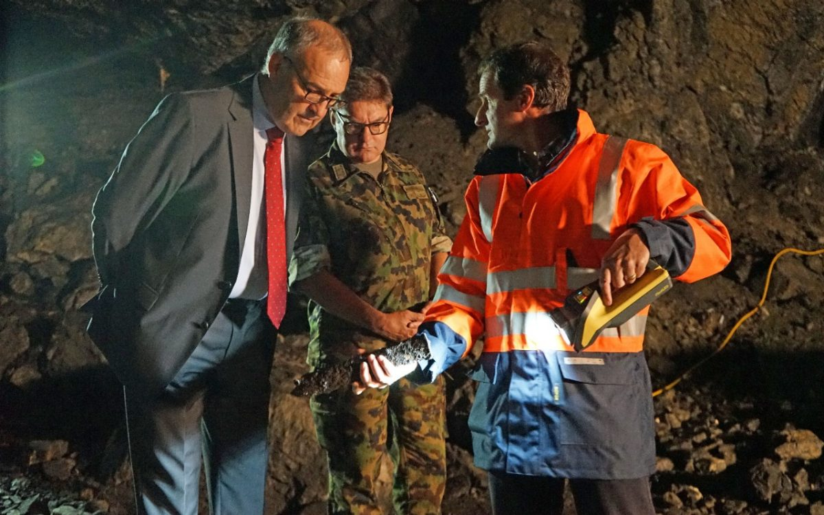 Reto Luginbühl, Experte Wissenschaft und Technologie bei Armasuisse, erklärt Bundesrat Guy Parmelin und dessen Sicherheitspolitischem Berater, Divisionär Melchior Stoller (Mitte) die Situation und die Risiken.